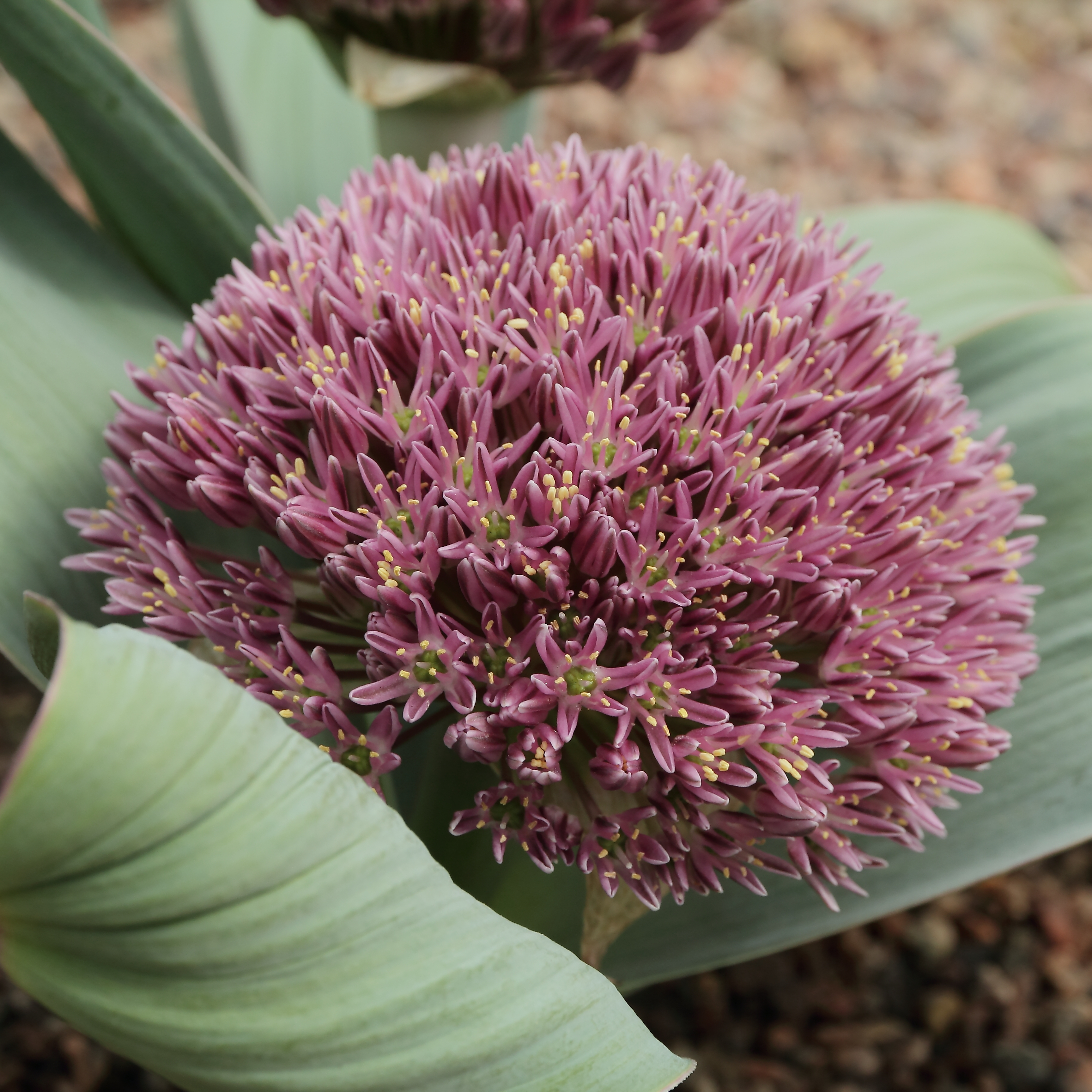 Allium akaka i Göteborgs Botaniska Trädgård.